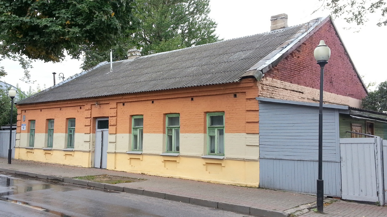 Беларуская (тарашкевіца): Забудова вул. Пакроўскай. г. Віцебск This is a photo of Belarusian heritage monument. Reference number: 213Г000059 ( WLM)